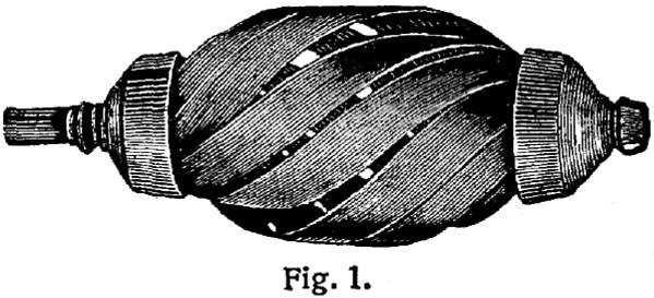 Der „Rohrreiniger von Nowotny“ kam unter der Deutsches Reichspatentnummer D.R.P. 117277 von der Hannoverschen Eisengießerei, „vor[mals] Deutsche Röhrenreinigungsgesellschaft O. Mierisch & Co. in Dresden“, zum Einsatz ...